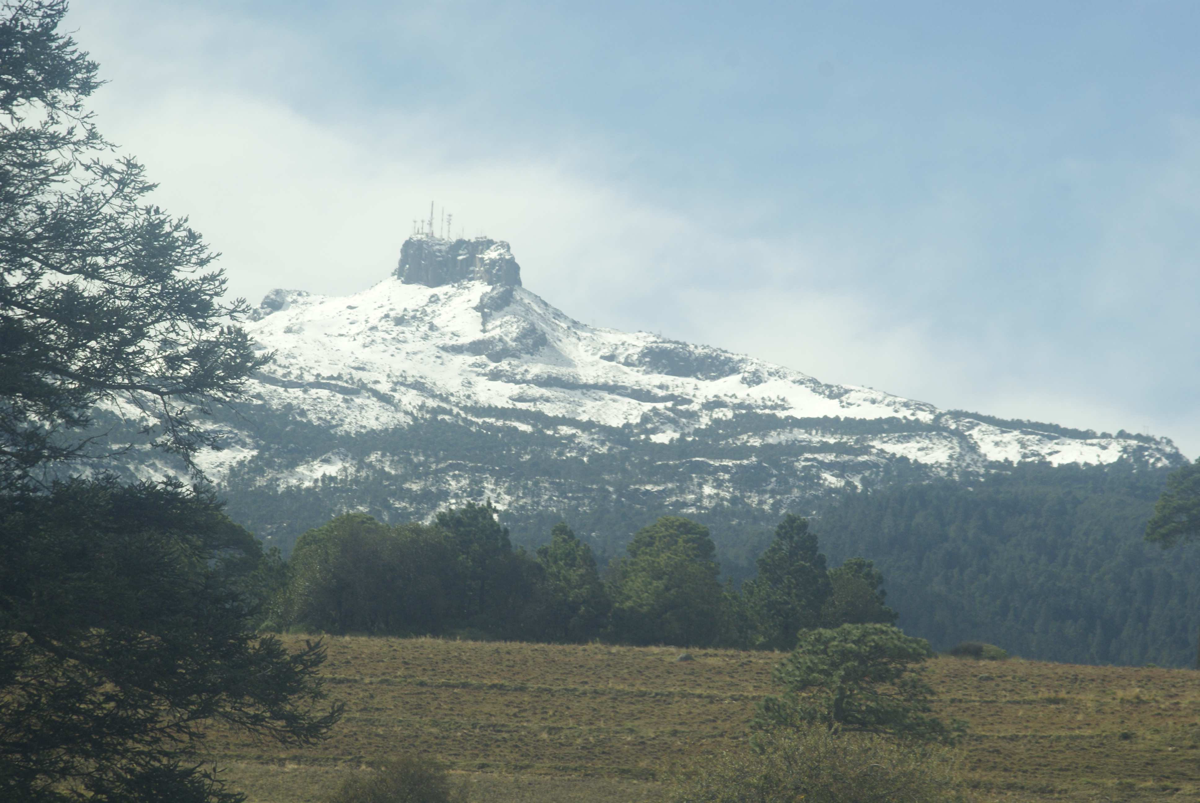 cofre de perote nevado